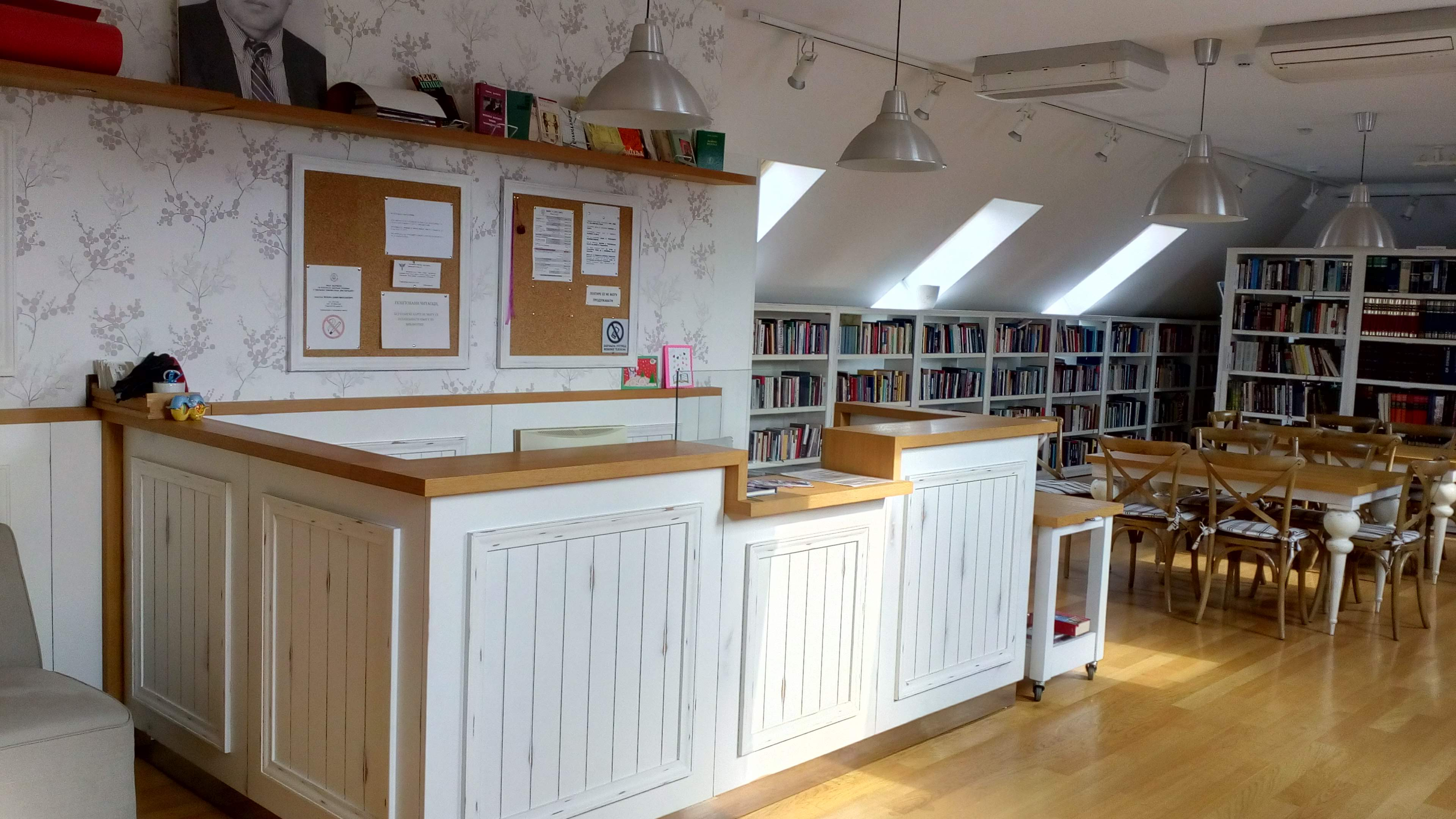 Biblioteka "Moma Dimić" u Mirijevu, GO Zvezdara, Beograd, ogranak Biblioteke grada Beograda